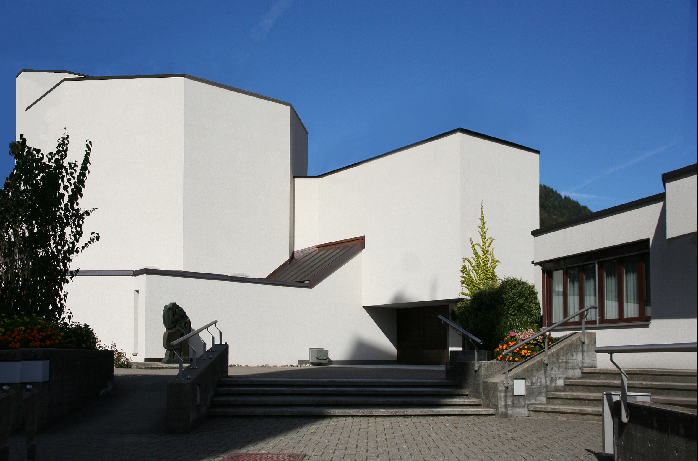 Römisch-katholische Pfarrkirche St. Felix und Regula Wattwil